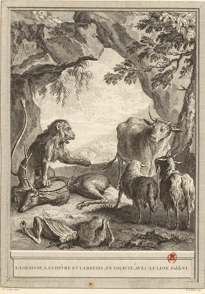 Gravure réalisée par Pierre Etienne Moitte d'après un dessin de Jean-Baptiste Oudry représentant la fable La génisse, la chèvre et la brebis en société avec le lion de Jean de La Fontaine (fable 6 du livre I). Cette gravure est parue dans l'édition complète des fables de La Fontaine, parue en quatre tomes chez l'éditeur Desaint & Saillant, rue saint Jean de Beauvais à Paris, 1755-1759.